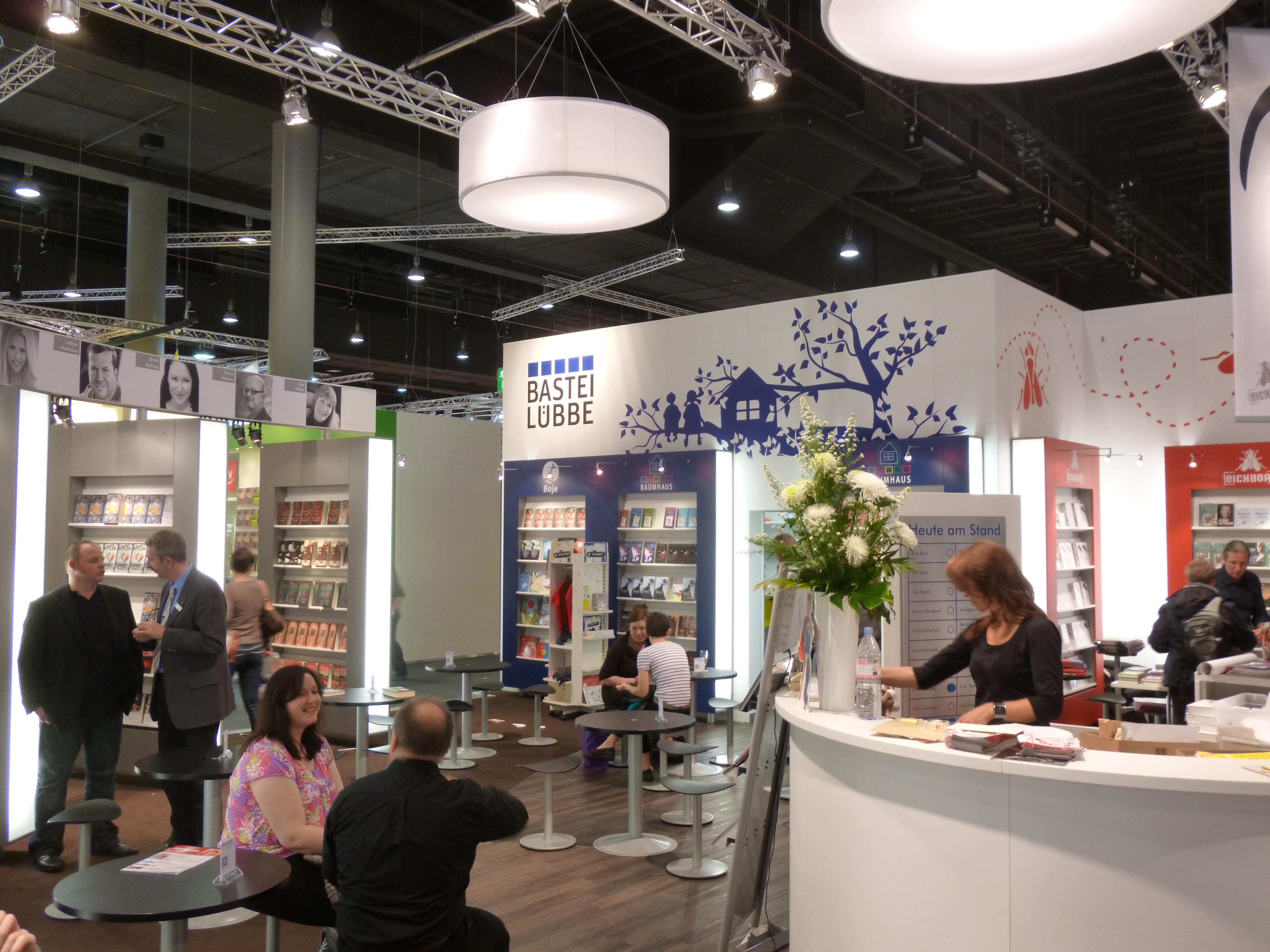 stando de la eldonejo Bastei Lübbe en la Frankfurta librofoiro 2012